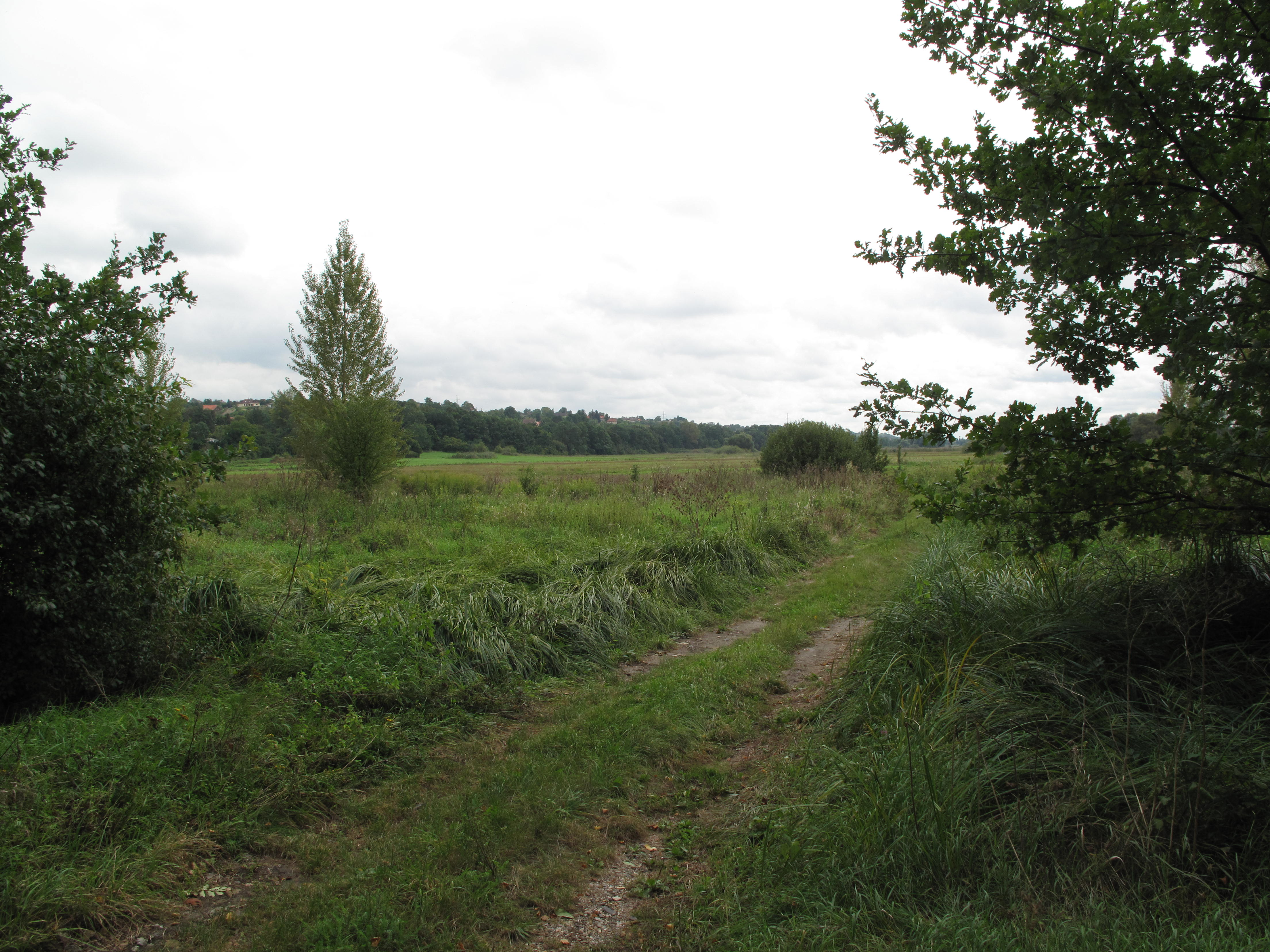 Kelské louky